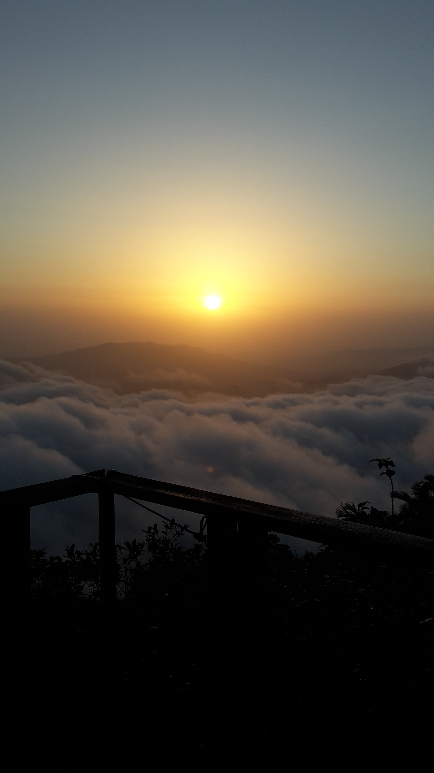 Amanecer desde el Pico Diego de Ocampo